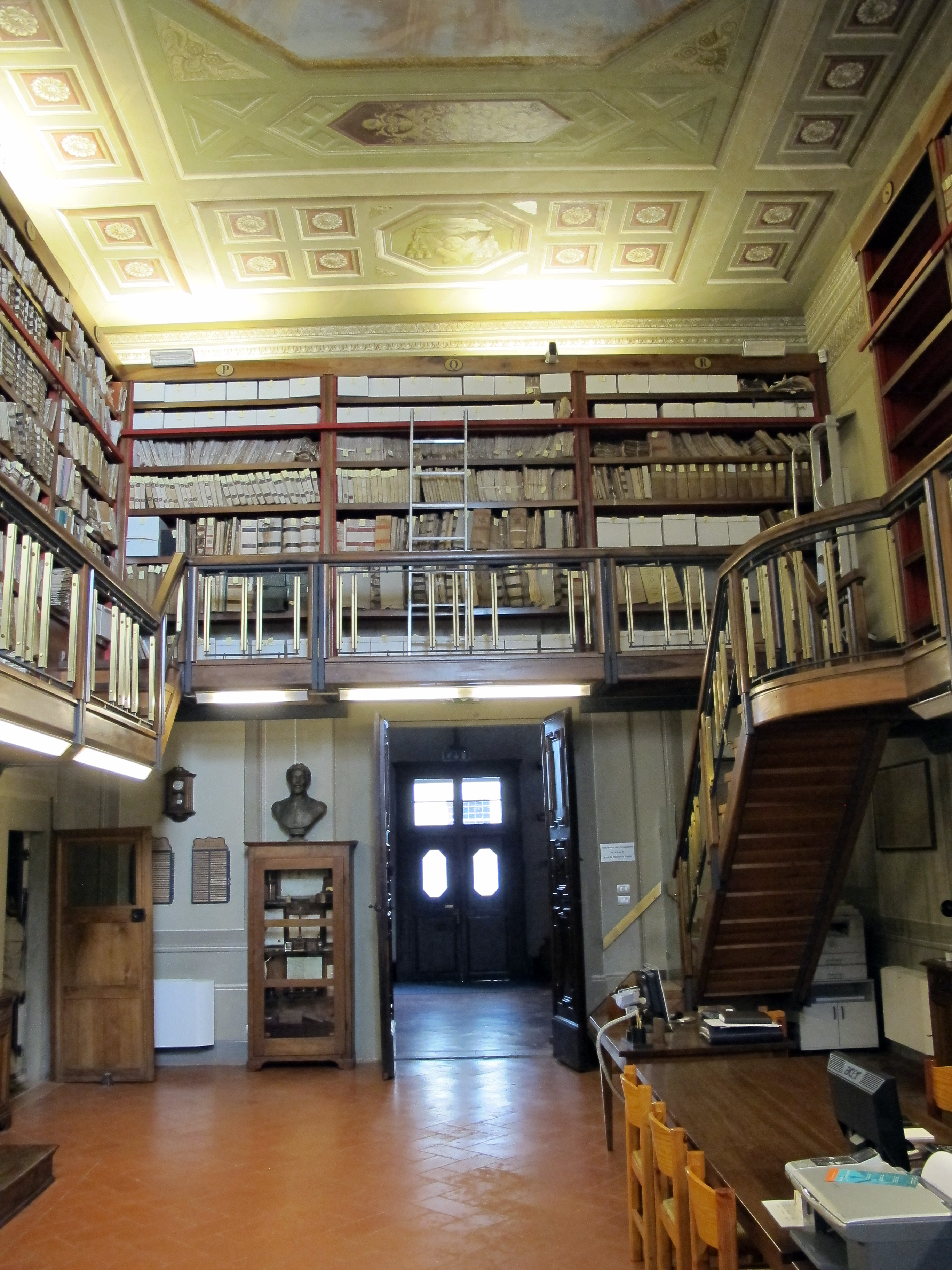 Capitolo di firenze, biblioteca (ex-chiesa s. piero in celoro)